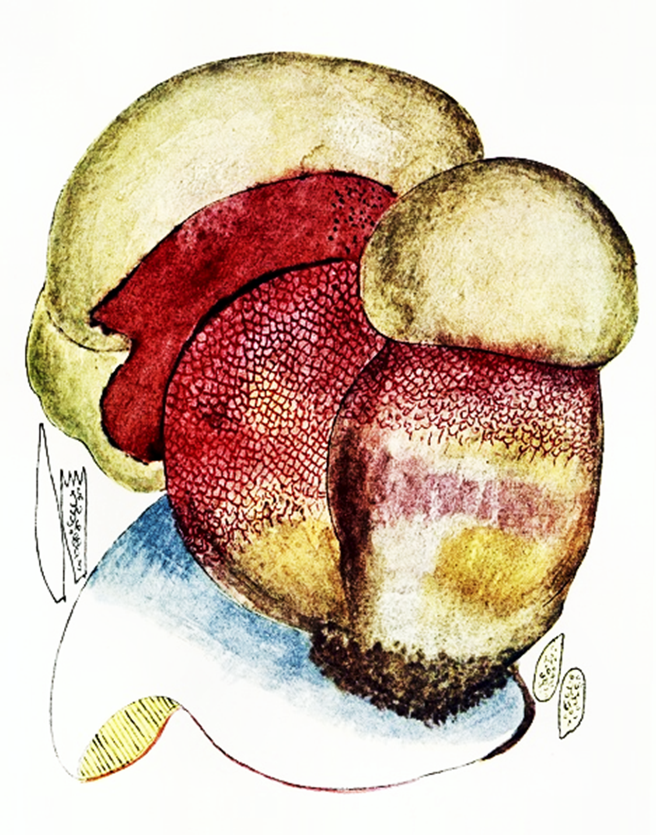 Giacomo Bresadola: Boletus Satanas